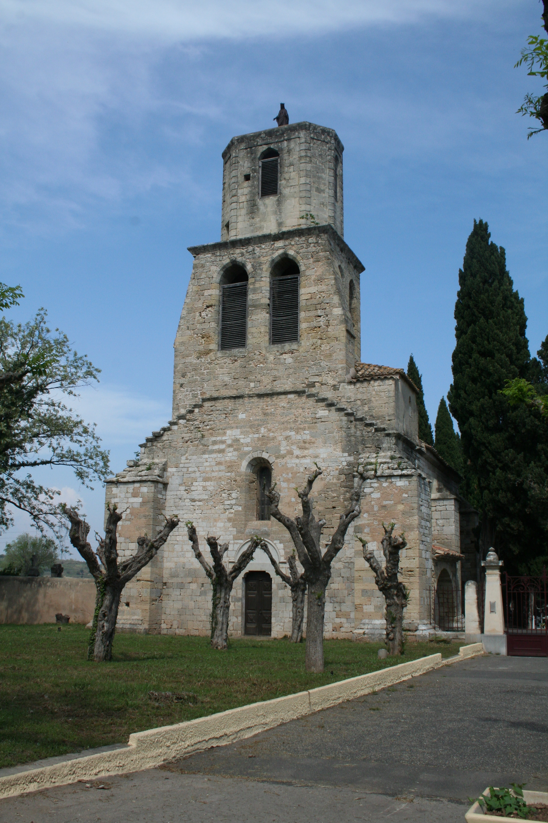 Paulhan (Hérault) - Église romane Notre-Dame des Vertus.